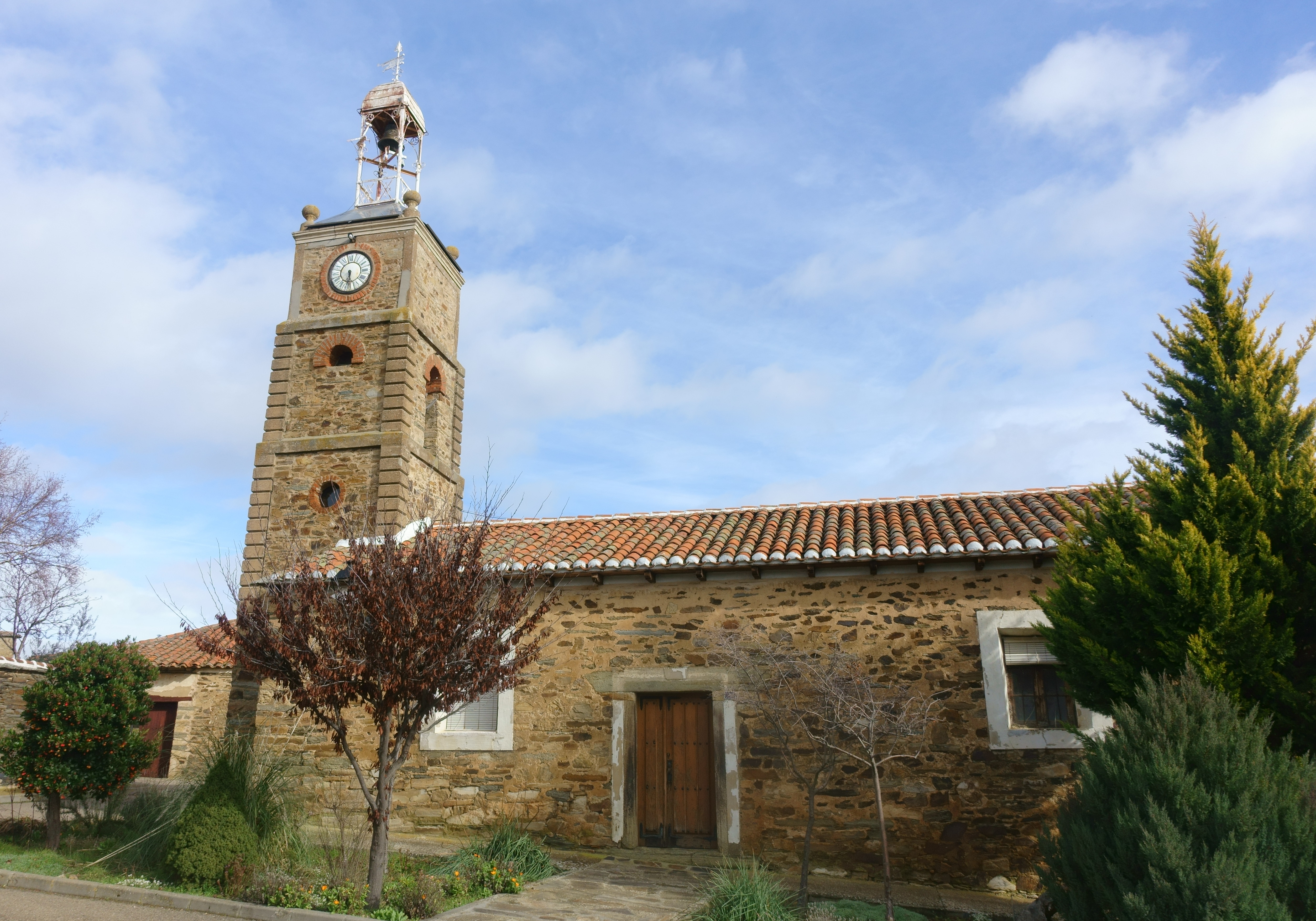 Ermita de San Miguel, en el barrio de Arriba de Santiago Millas (León, España).